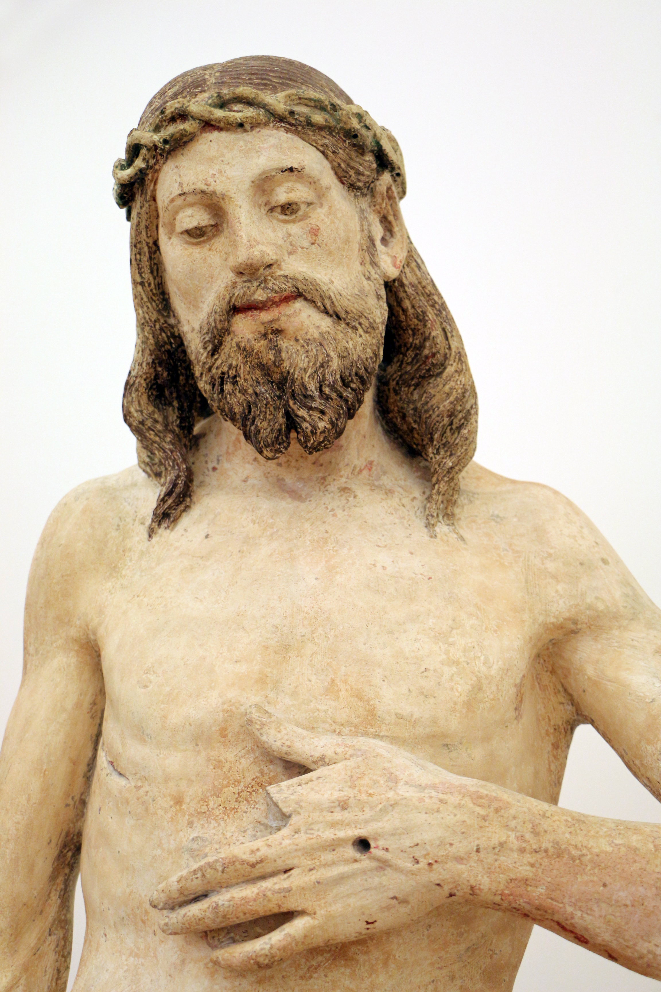 Palazzo Lanfranchi This is a photo of a monument which is part of cultural heritage of Italy.